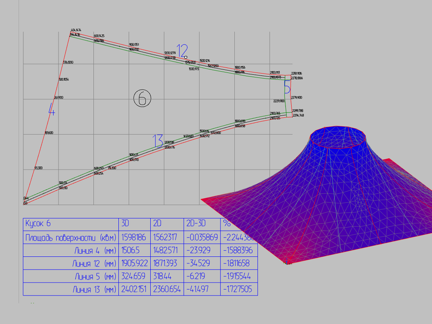 Развёртка куска тента